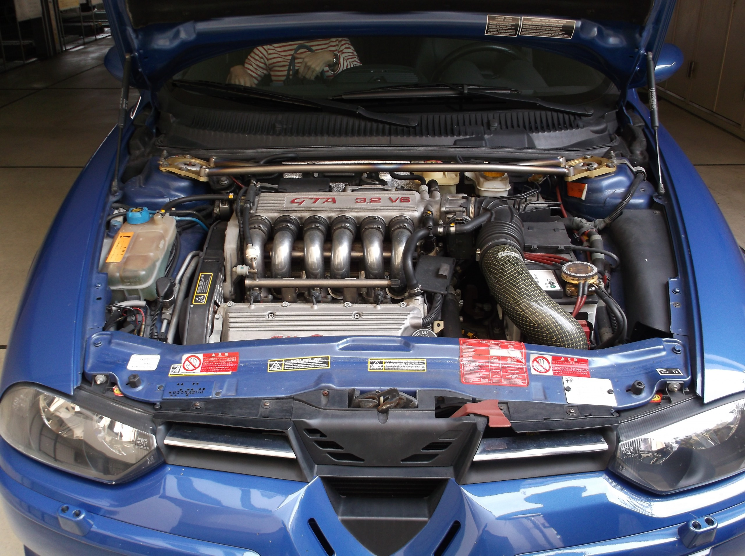 アルファロメオ GTAのエンジン。